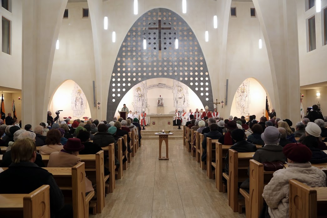 Boldog Meszlényi Zoltán templom